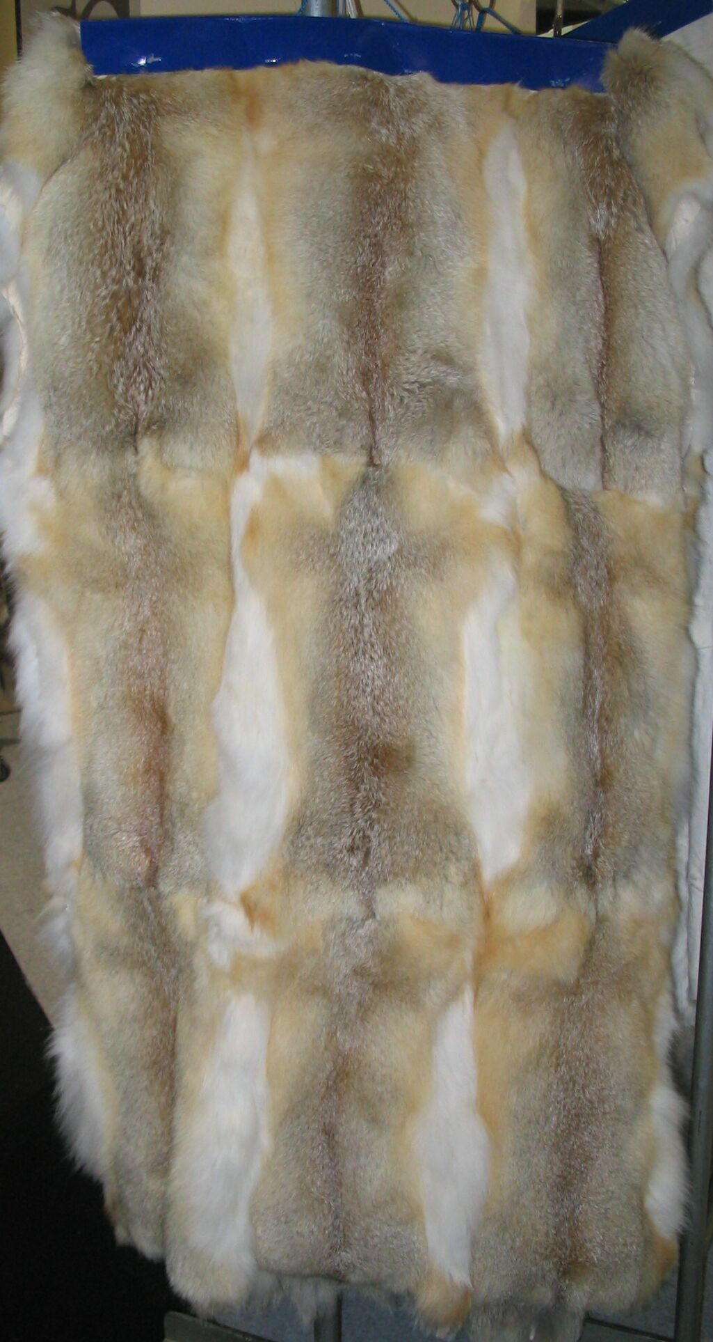 Mongolian fox plate / Tafeln aus mongolischen Füchsen (Halbfertigprodukt) auf der Pelzmesse Fur & Fashion in Frankfurt.